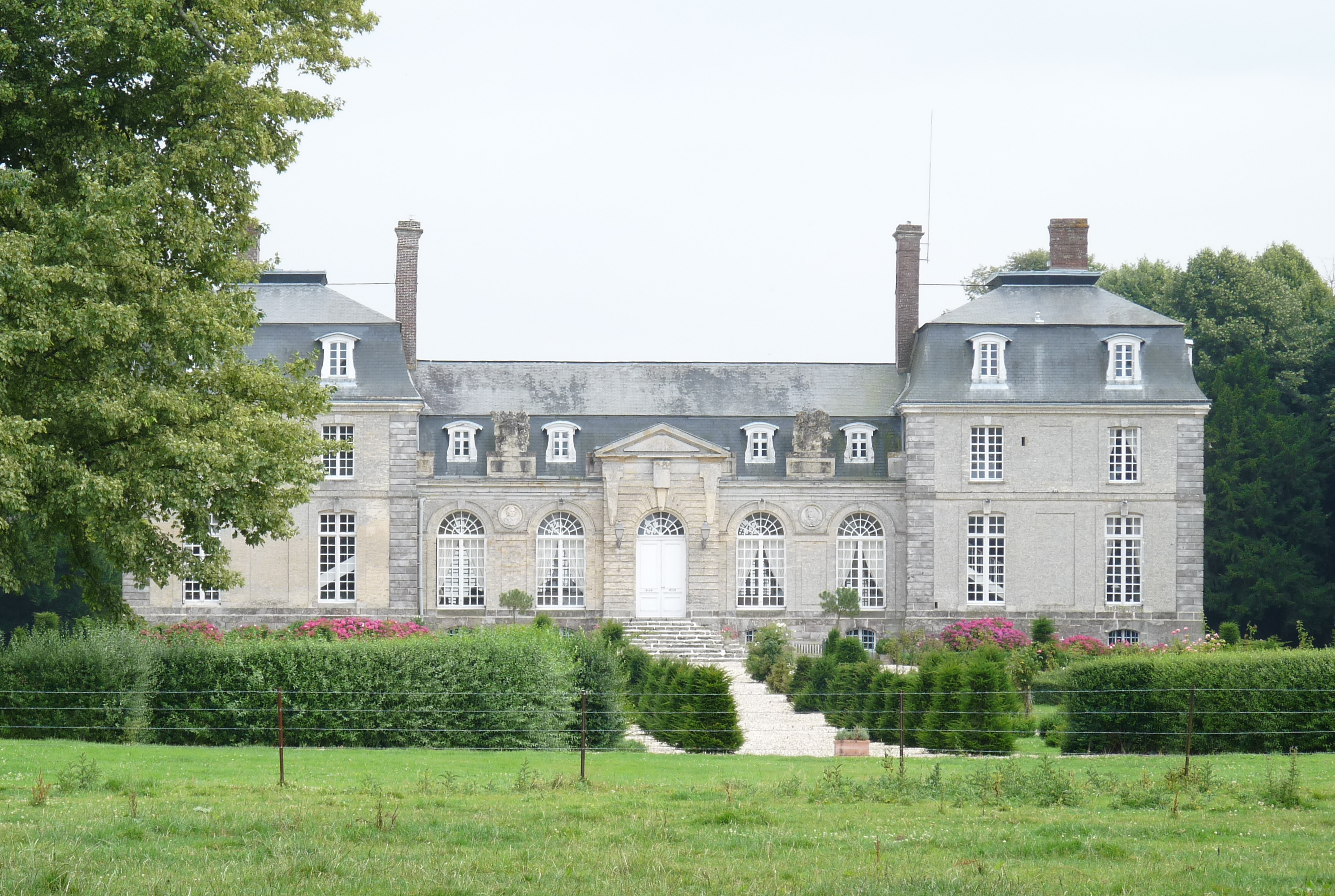 Château d'Anglesqueville-les-Murs (Inscrit) .